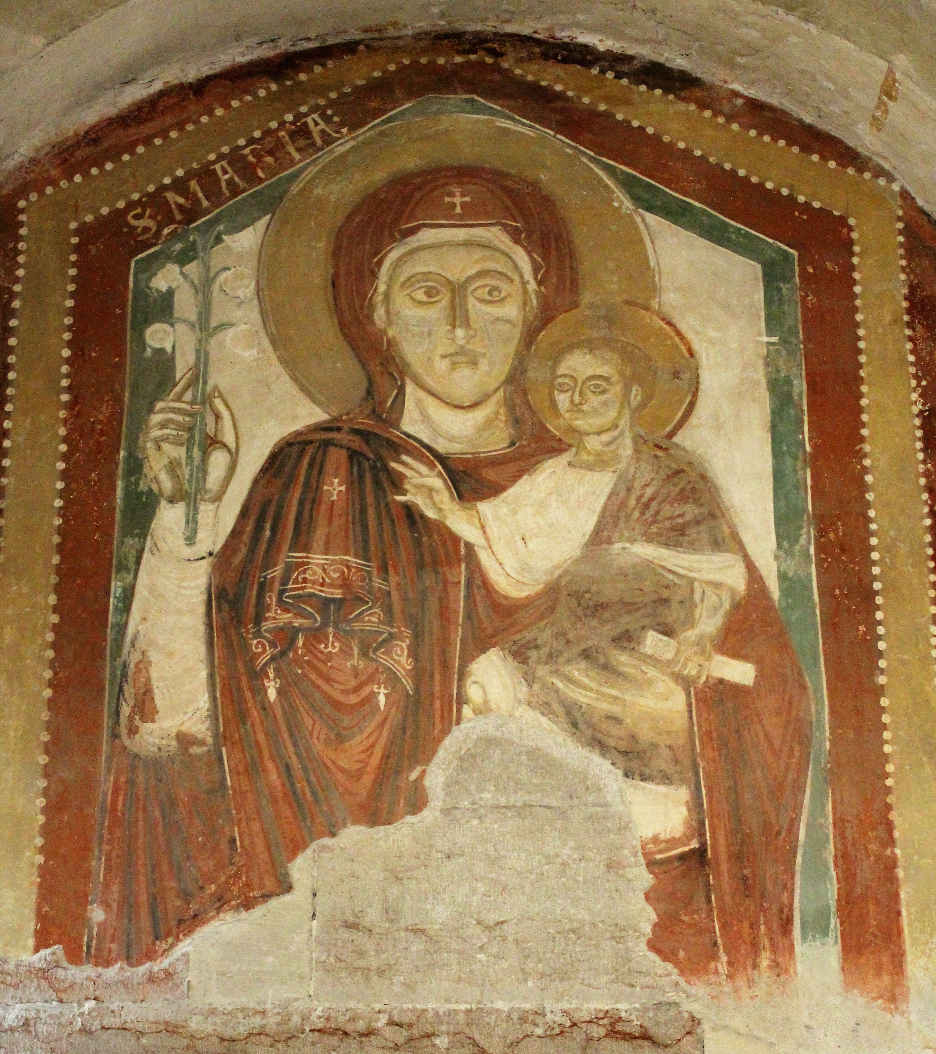 Affreschi medievali della cripta della Basilica di San Zeno a Verona